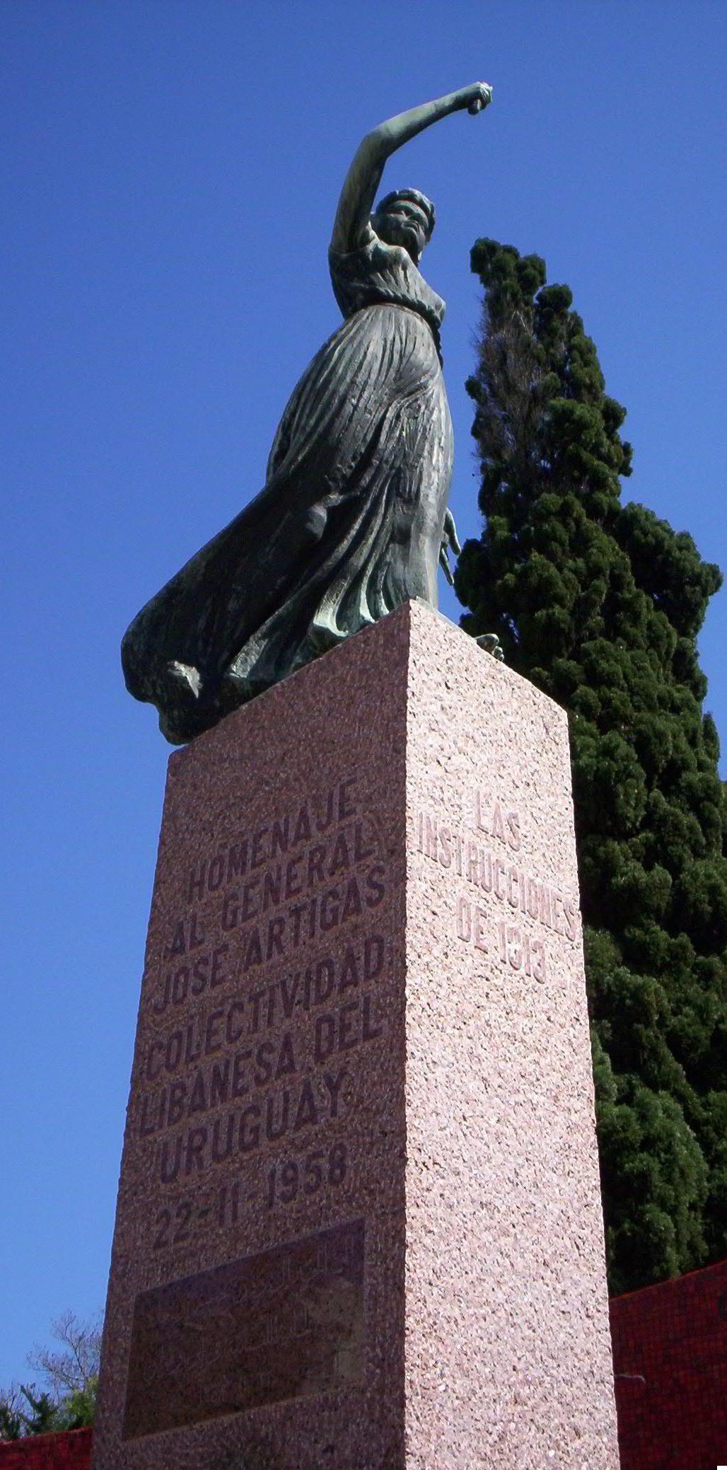 General José Artigas (Homenaje de la colectividad libanesa). Ubicada en el departamento de Montevideo